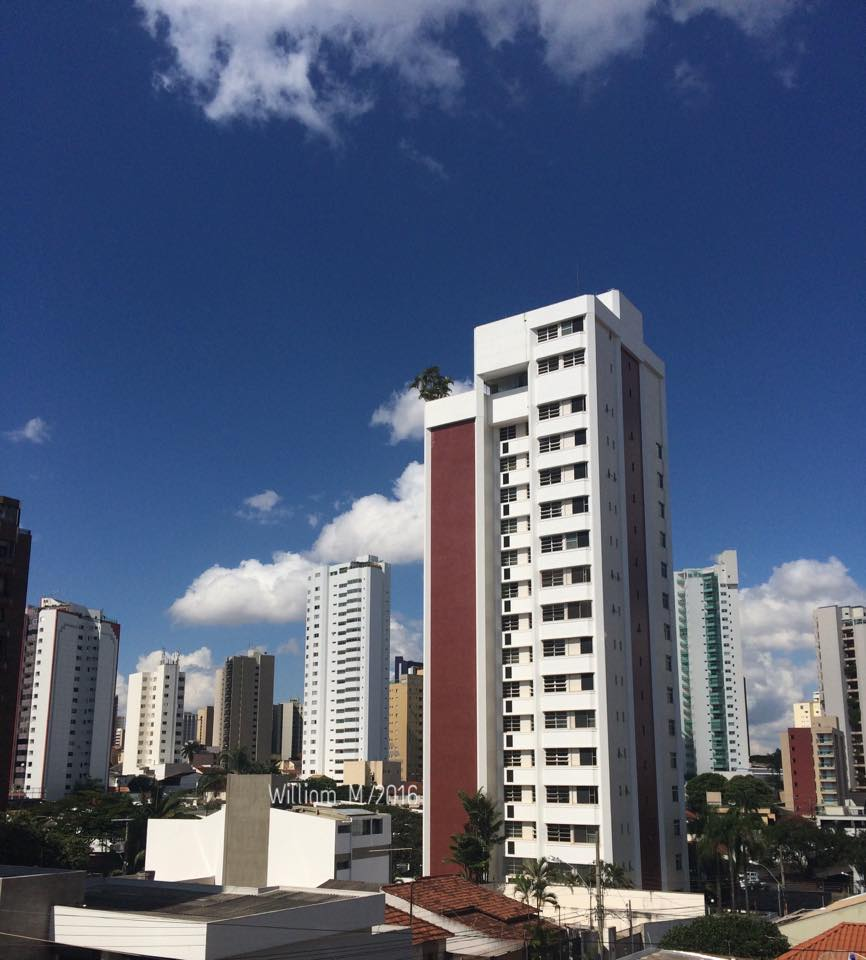 Foto parcial do Centro de Uberlândia, Brasil.